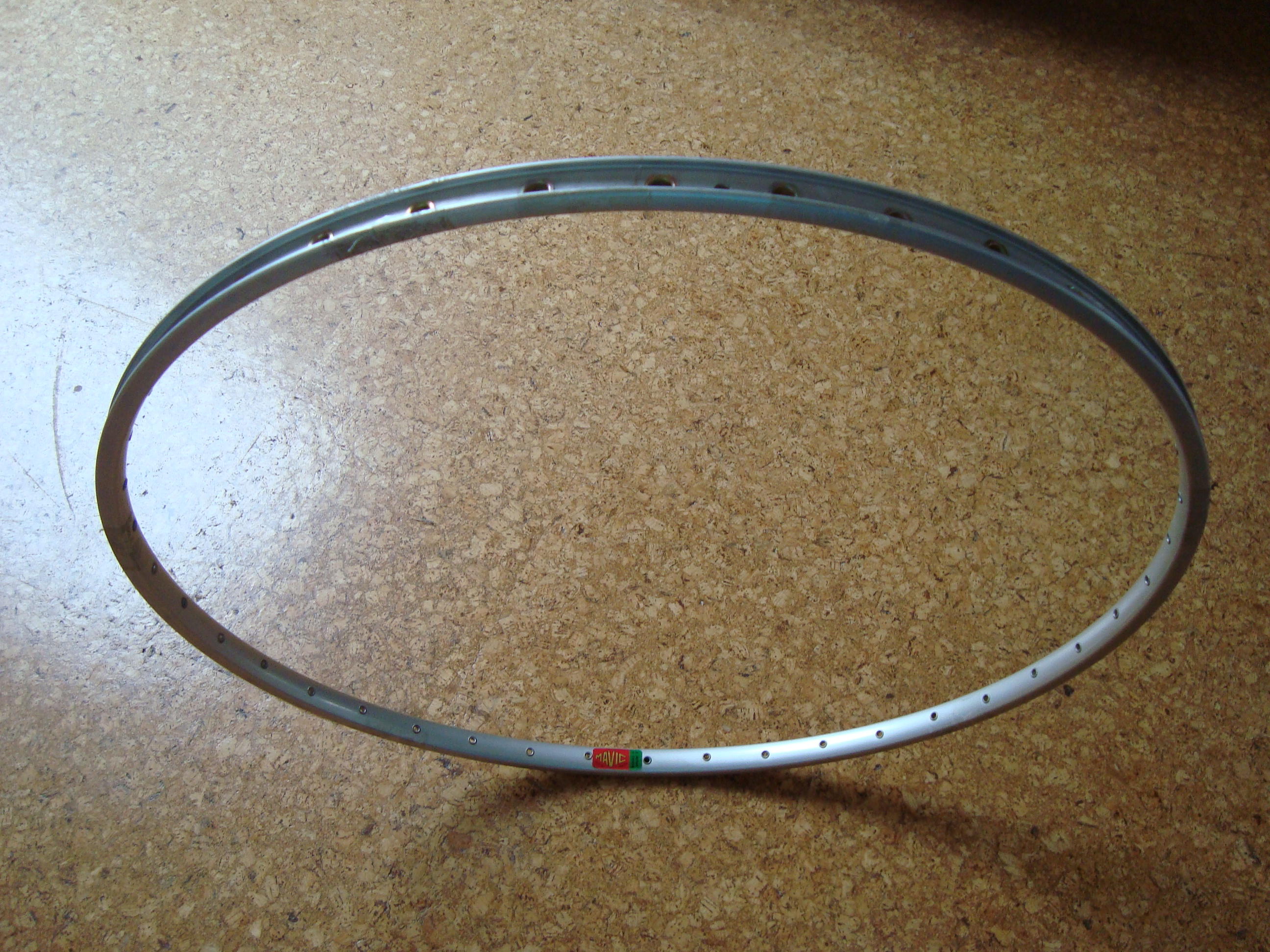 Felge für Fahrräder Typ Mavic Module 3Argent D 48Loch doppelt geöst